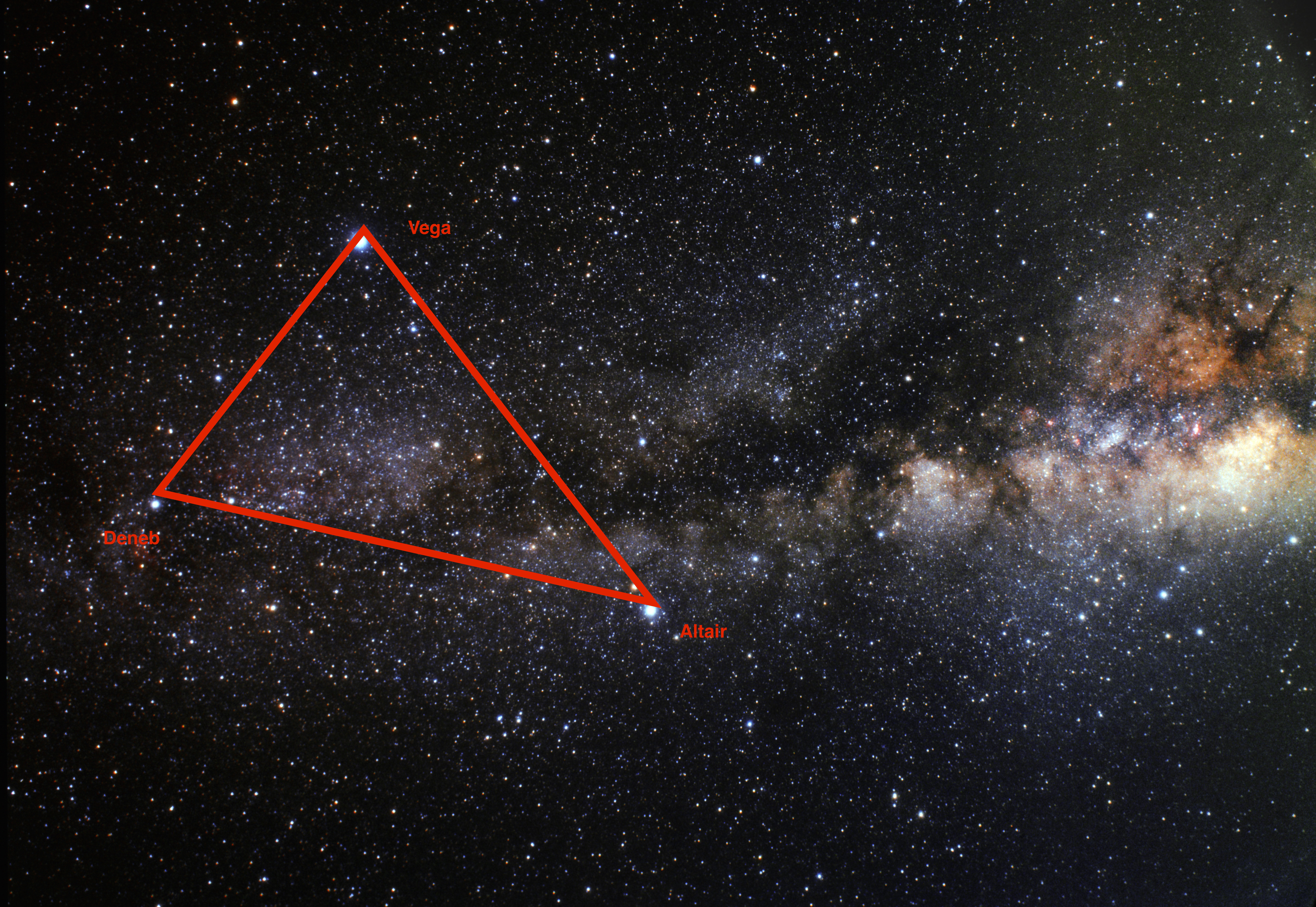 Schéma du triangle d'été sur image de la nasa